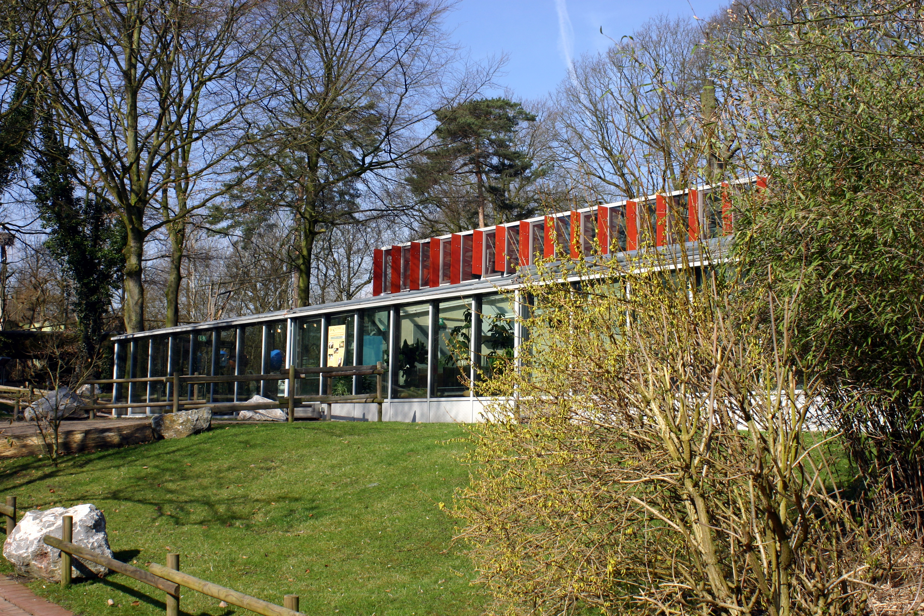 BiOCity: Centrum zur Erforschung der Biodiversität